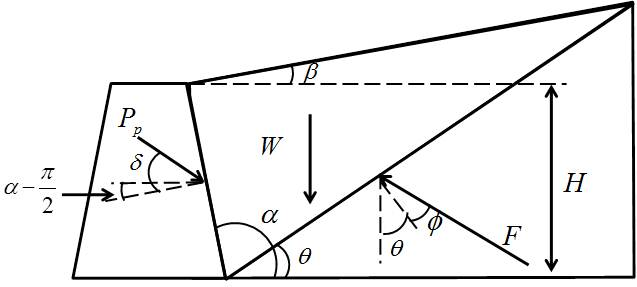 受働土圧時の地盤状態